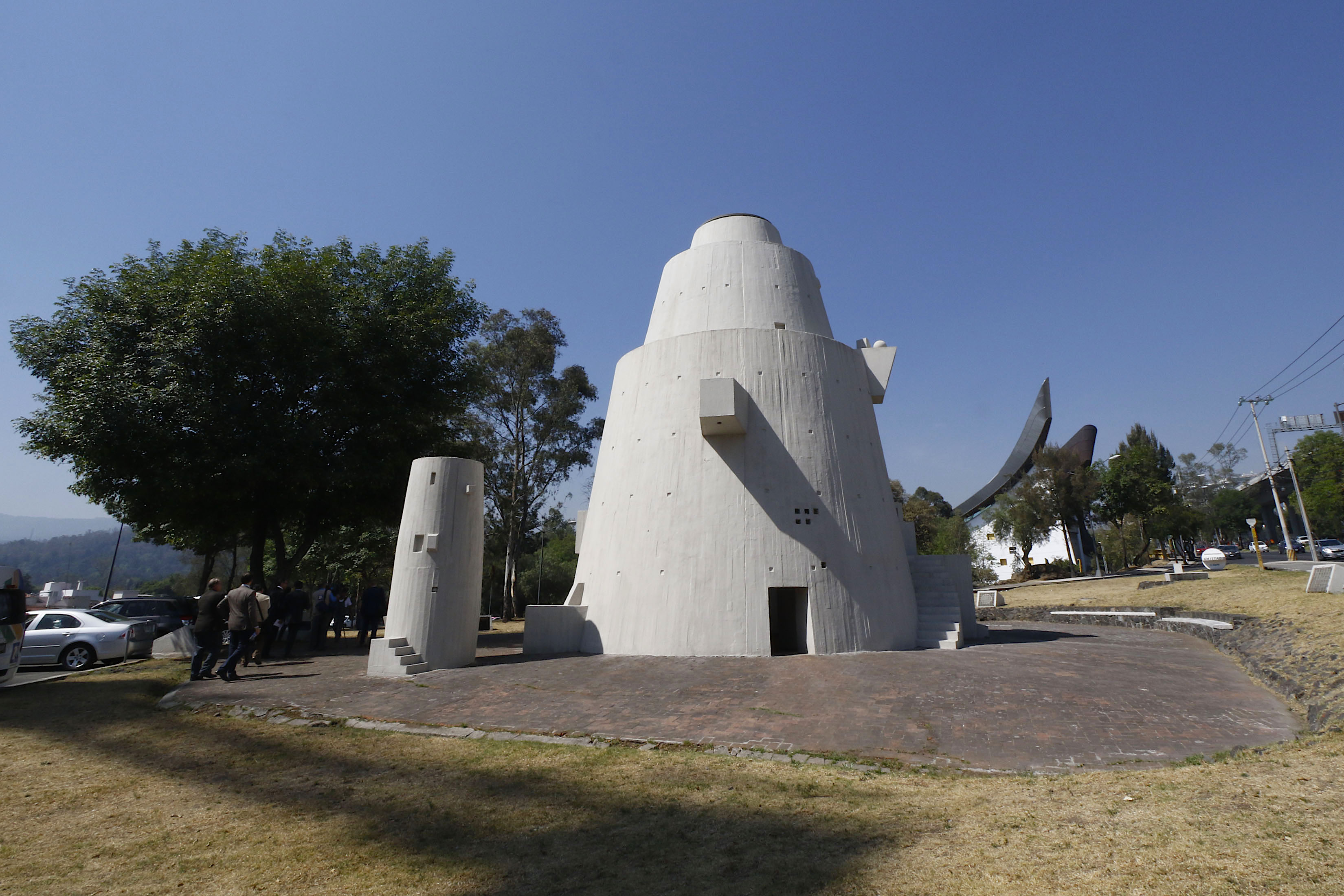 Martes 12 de marzo de 2019. En la escultura habitable Torre de los Vientos, ubicada en Periférico Sur, el secretario de Cultura de la Ciudad de México, José Alfonso Suárez del Real y Aguilera; Dolores Martínez Orralde, directora de Arquitectura y Conservación del Patrimonio Artístico Inmueble, del INBA; acompañado del embajador de Alemania en México, Peter Tempel y Daniel Goeritz, hijo del artista Matias Goeritz, ofrecieron una conferencia de prensa para detallar el Programa de Apoyo a la Restauración de la Ruta de la Amistad México 68. Fotografía: Milton Martínez / Secretaría de Cultura de la Ciudad de México.